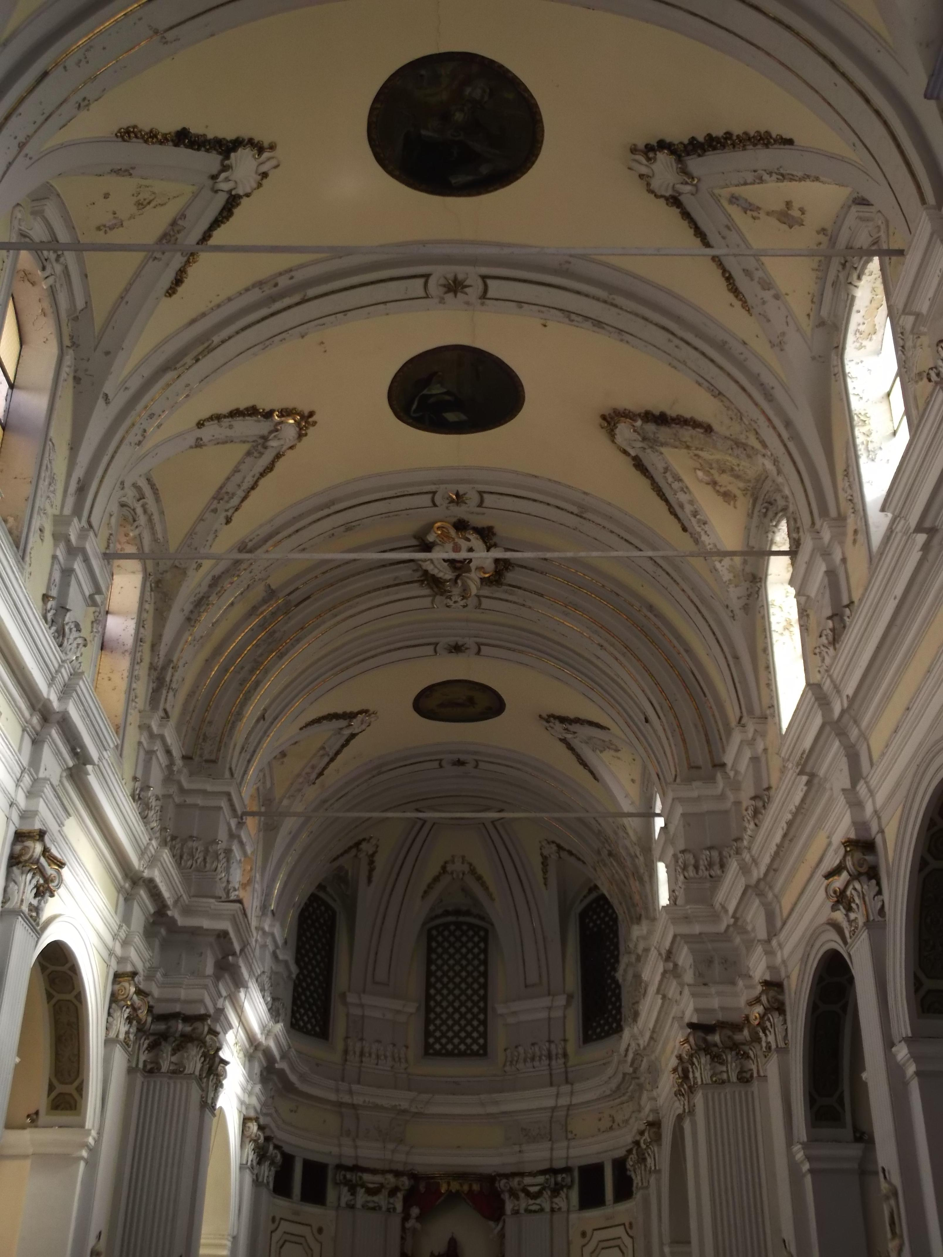 Volta